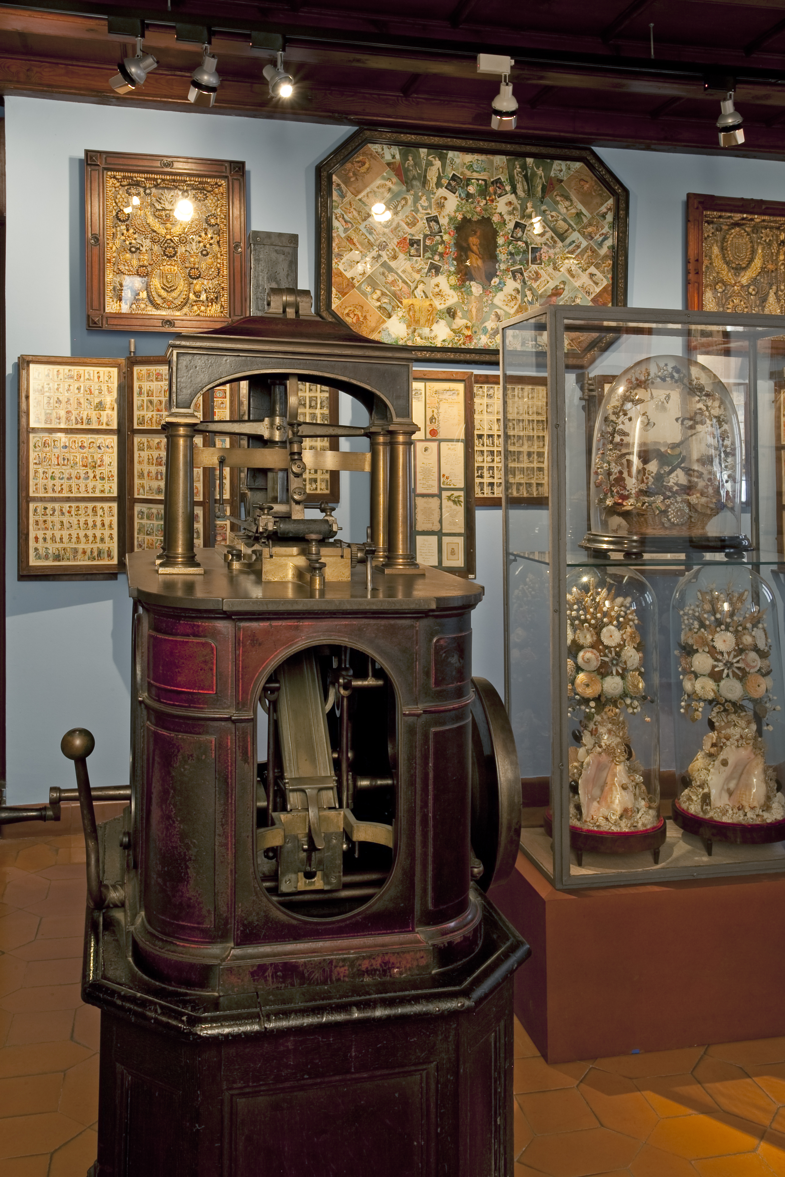 Floreres Gabinet col·leccionsita - Fot. GUILLEM F-H.jpg